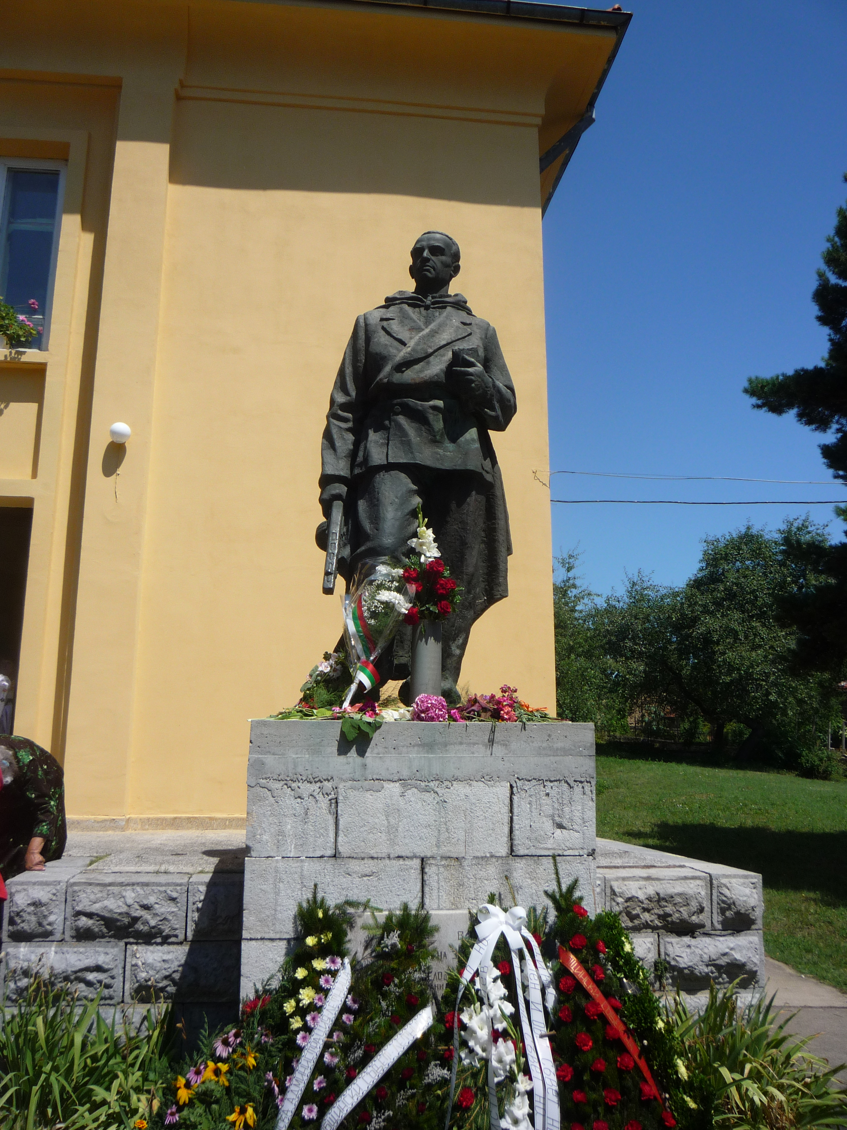 Паметник на Христо Кърпачев, село Кърпачево, област Ловеч.